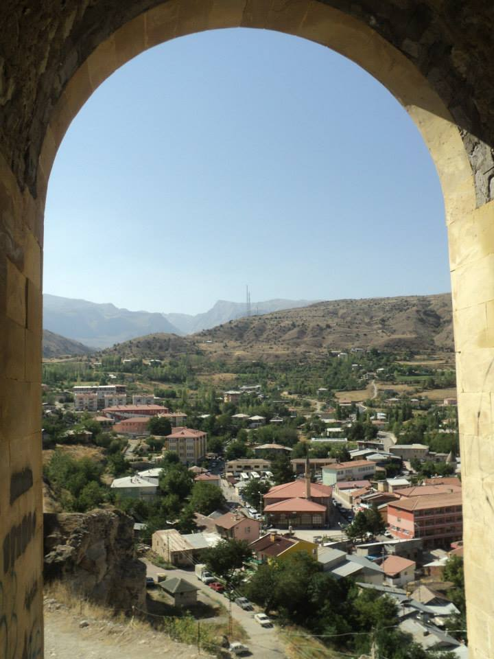 Kemah Kalesinden Bakış